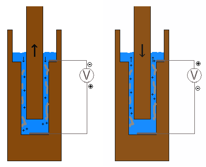 Arbeitsschema eines Particle Charge Detectors zu Bestimmung des Strömungspotentials